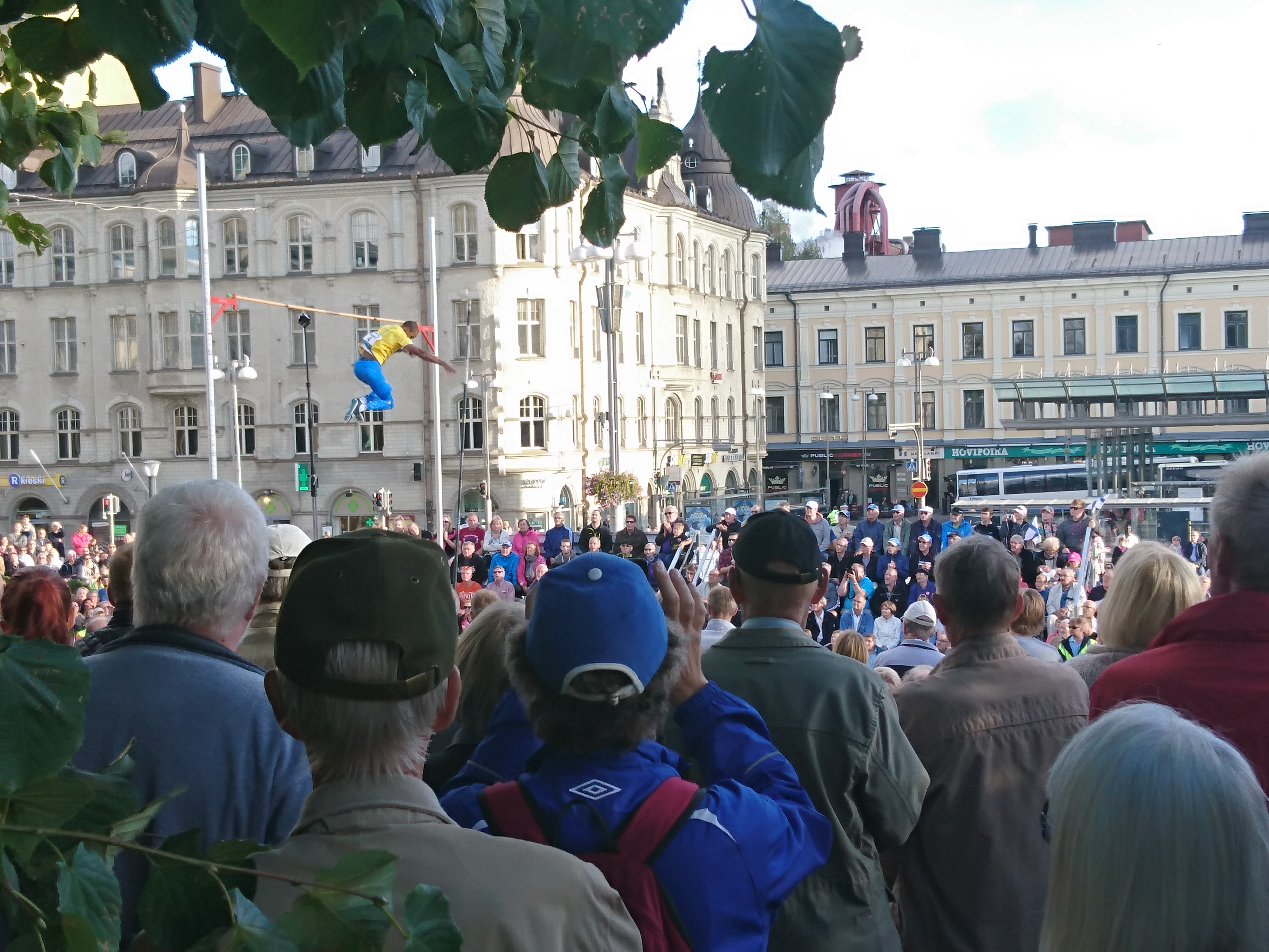 Miesten seiväshyppy Tampereen Keskustorilla Suomi-Ruotsi-maaottelussa 2016